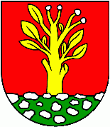 герб с. Чельовце: герб села